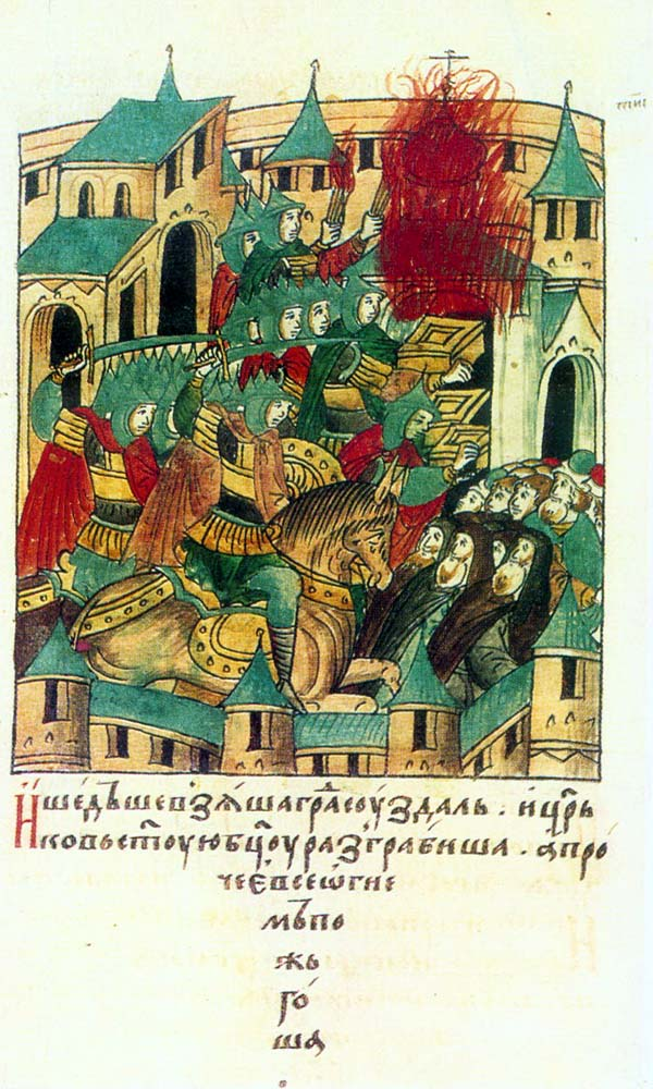 Летописные повести о монголо-татарском нашествии. Миниатюра. Лицевой свод XVI в. Голицынский том. (Санкт-Петербург, ГПБ)